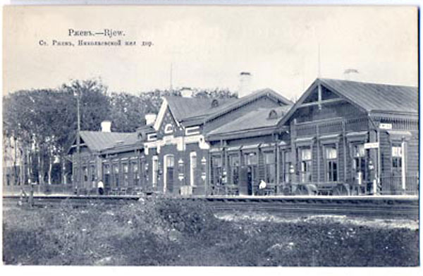 Александровский вокзал (ныне станция Ржев-Белорусский)